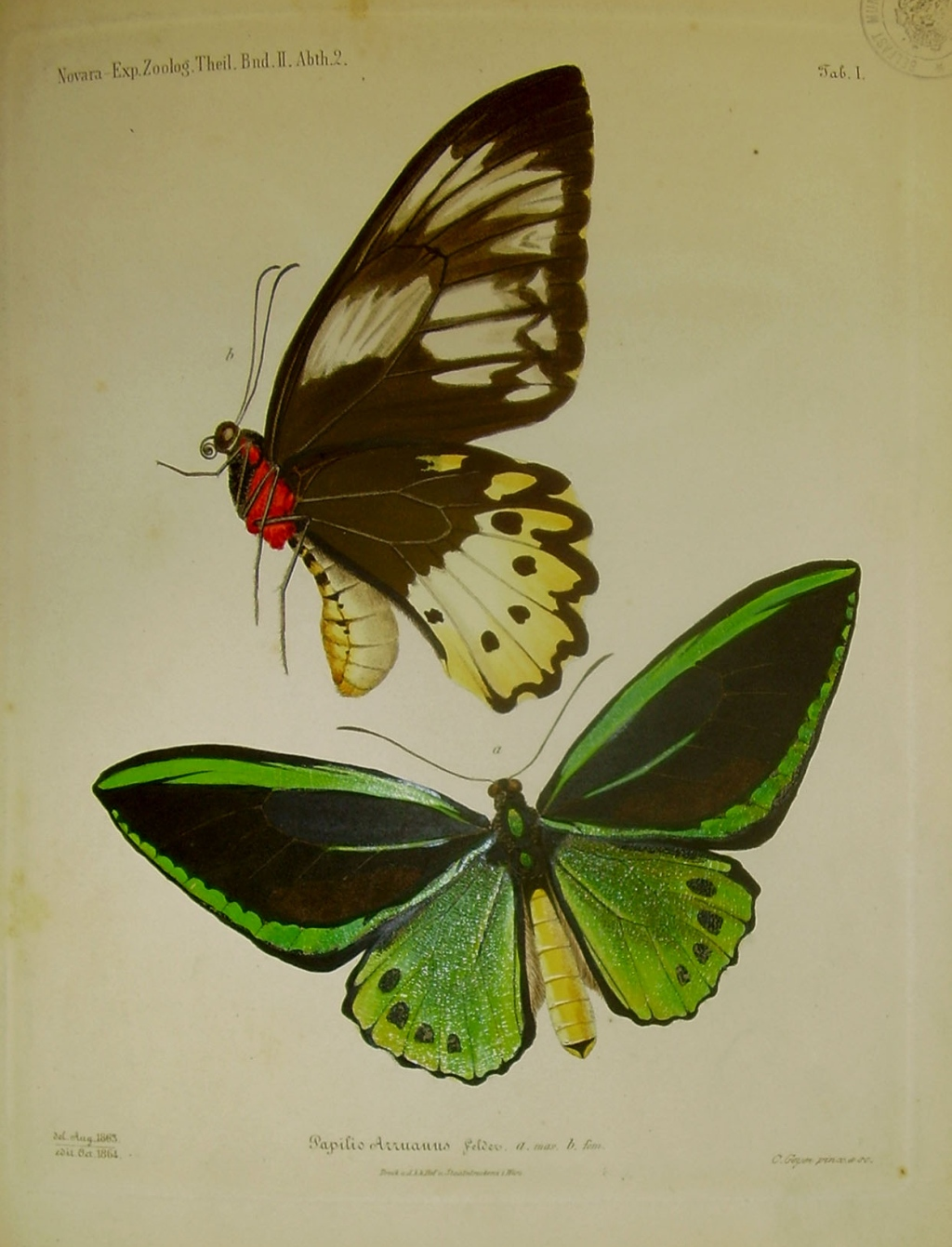 Plate from Reise Fregatte Novara.Zoologischer Theil, Lepidoptera. 1. Rhopalocera, Papilionidae